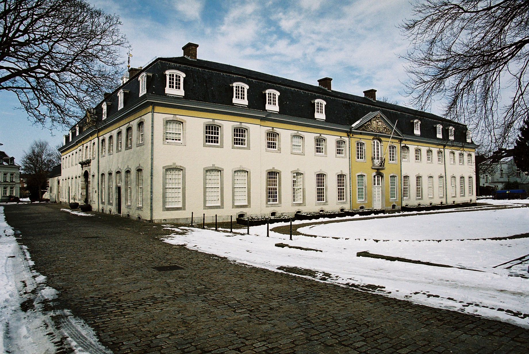 't Van Clermonthuis te Vaals.